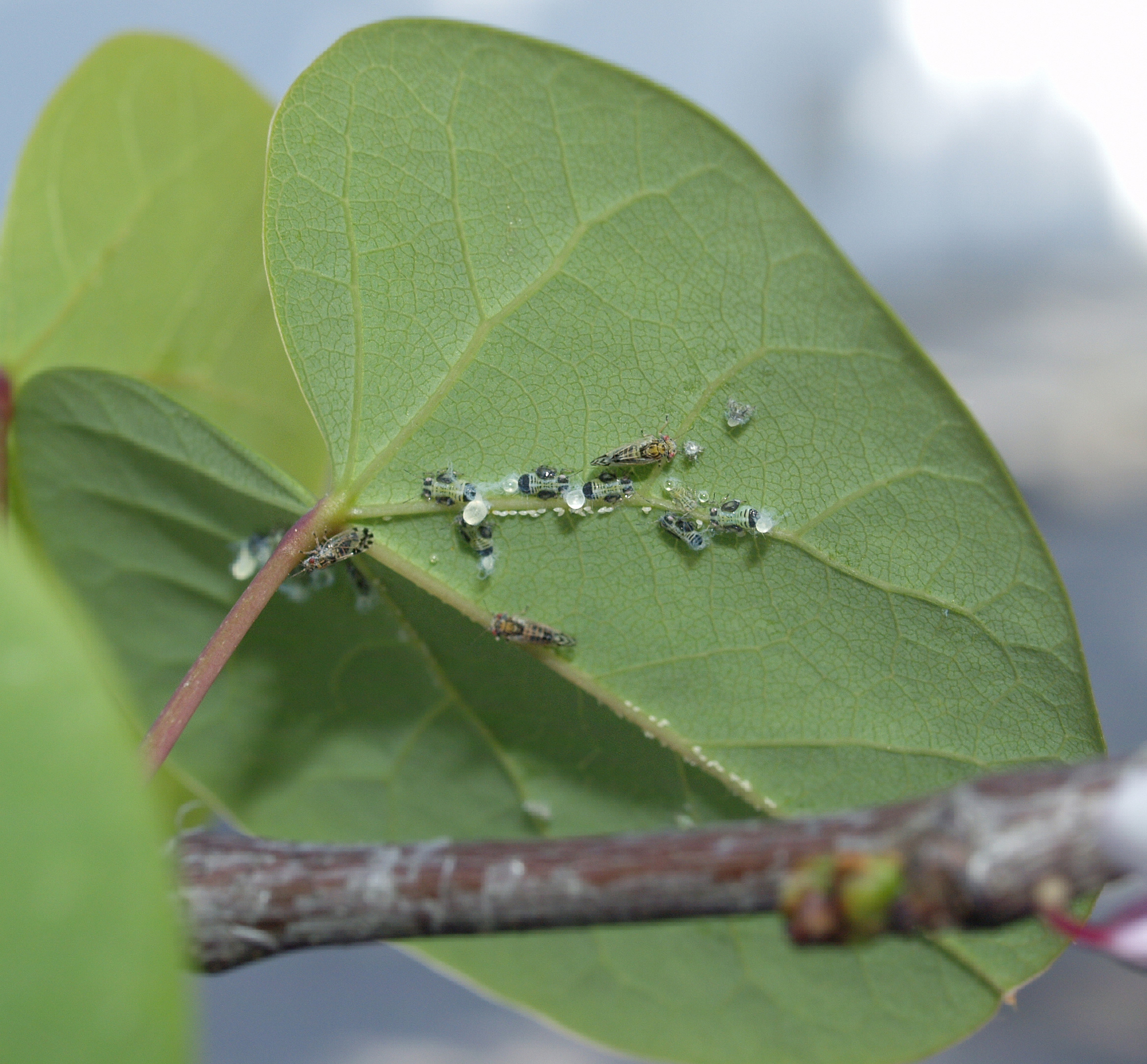 Cacopsylla pulchella (Psyllidae) sobre hojas de Cercis siliquastrum. Madrid, barrio de Peñagrande.